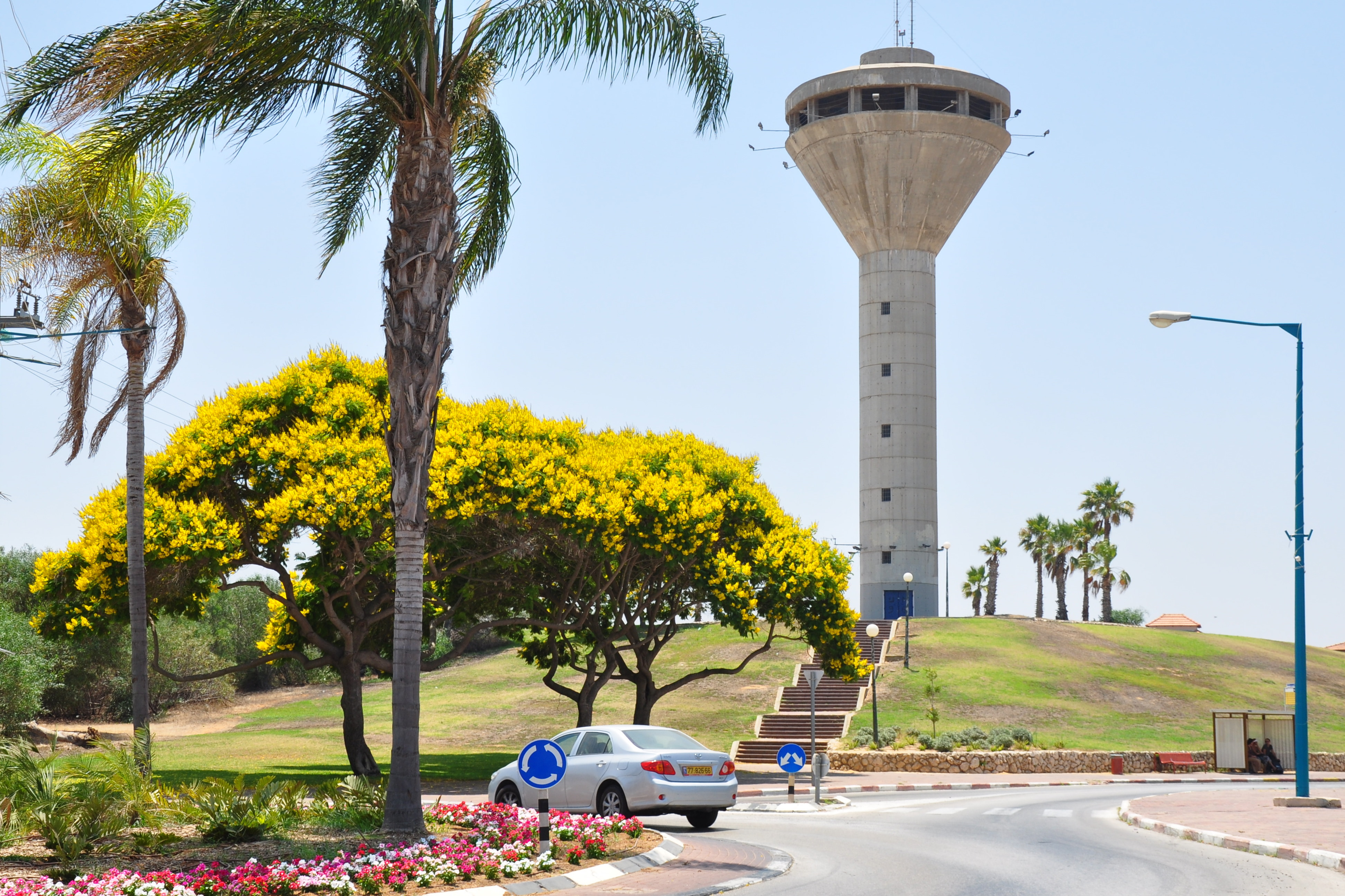 מגדל המים בעיר יבנה